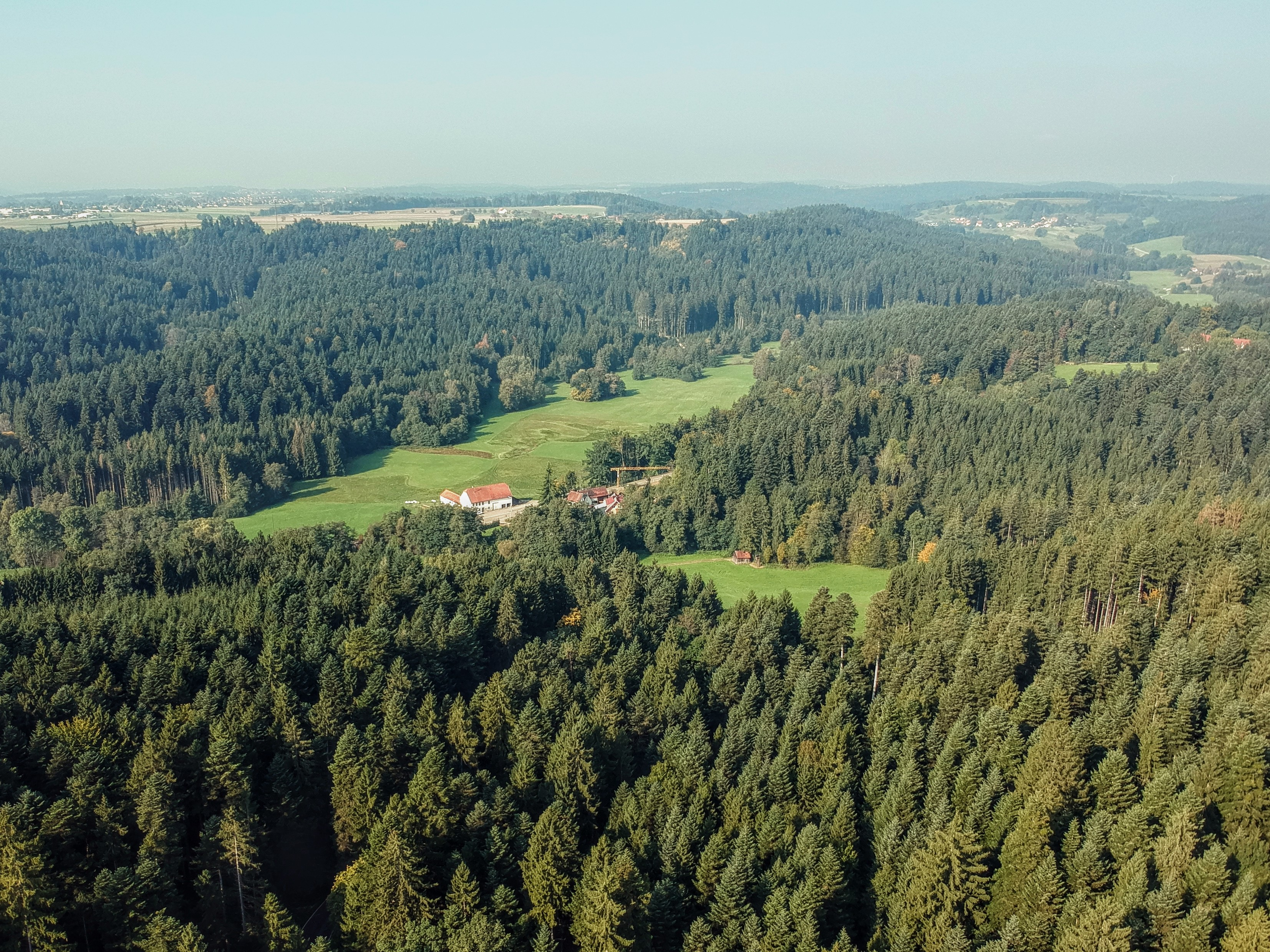 Blick über Leintal und Welzheimer Wald